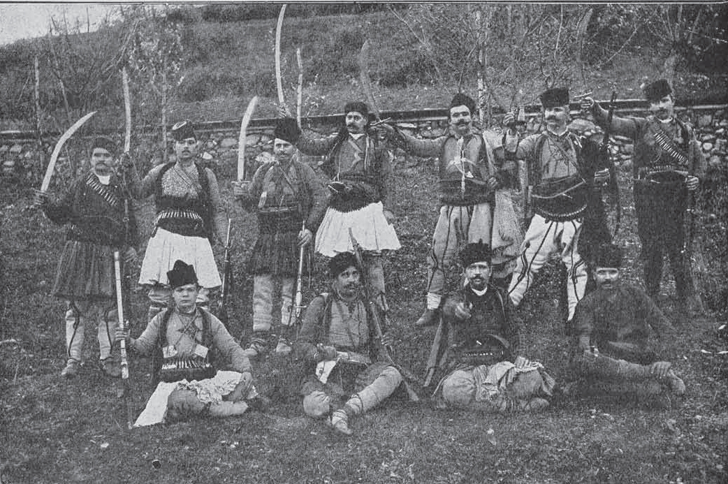 Кочо Лютата и Дончо Златков в 1895 година.